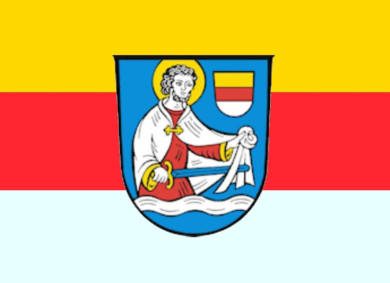 Flagge Arnschwang